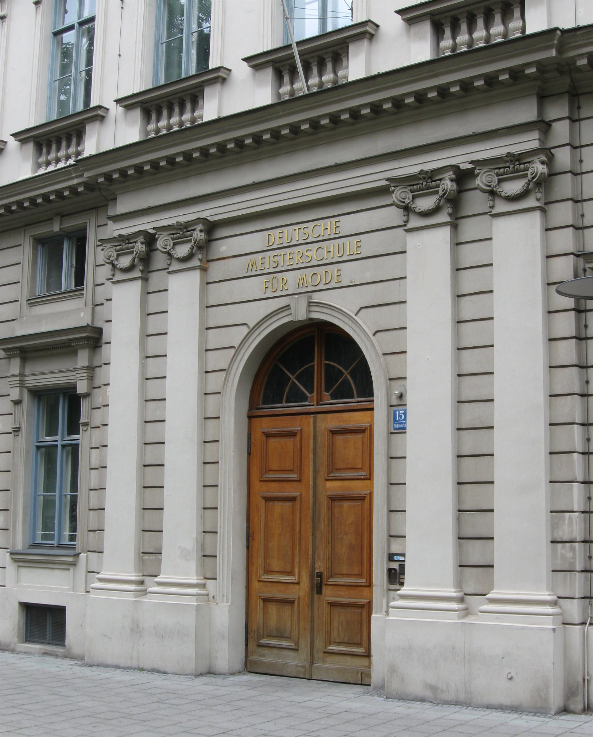 Neues Landschaftsgebäude, Meisterschule für Mode, Portal, Roßmarkt 15, München